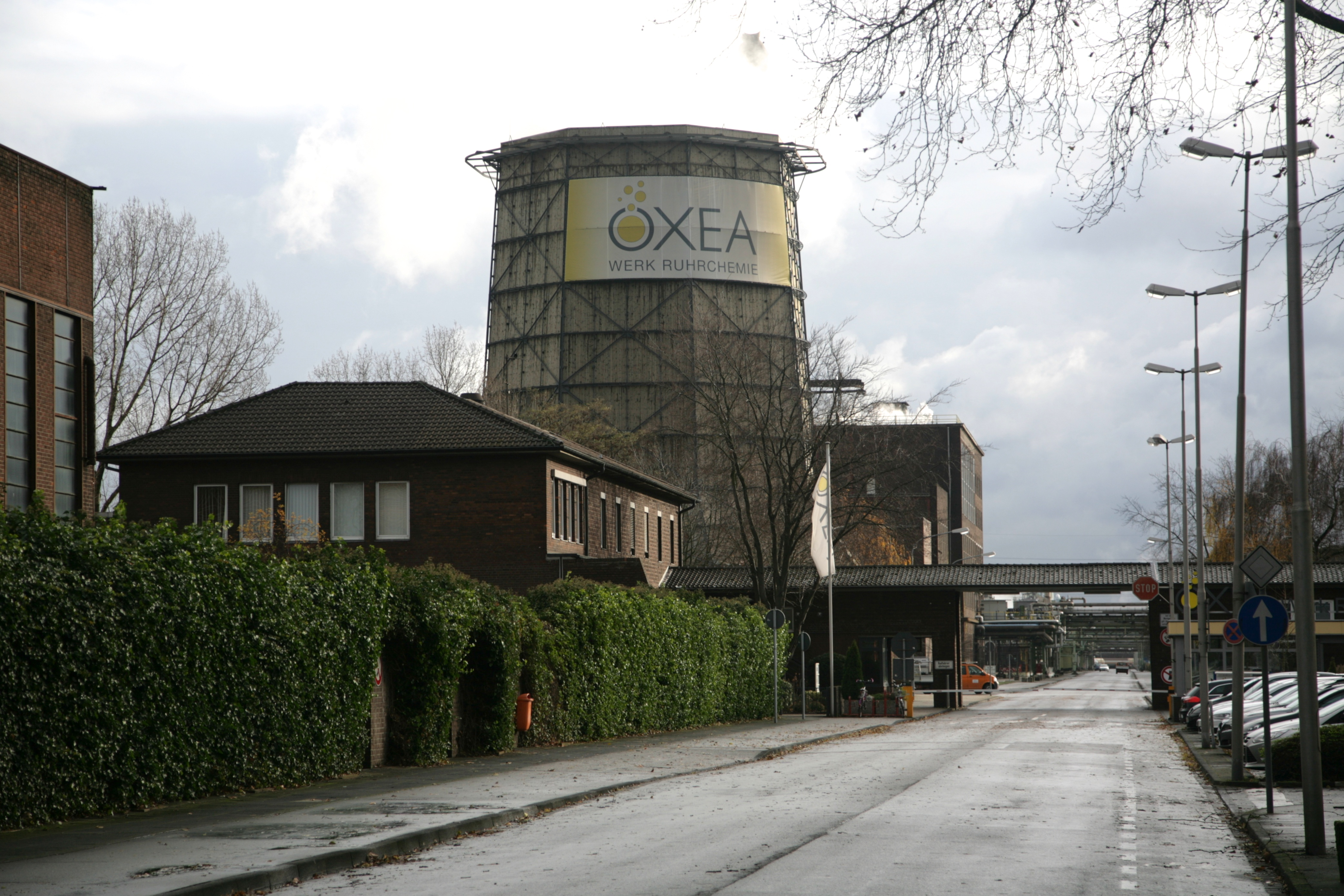 Oxea Werk Ruhrchemie, Oberhausen